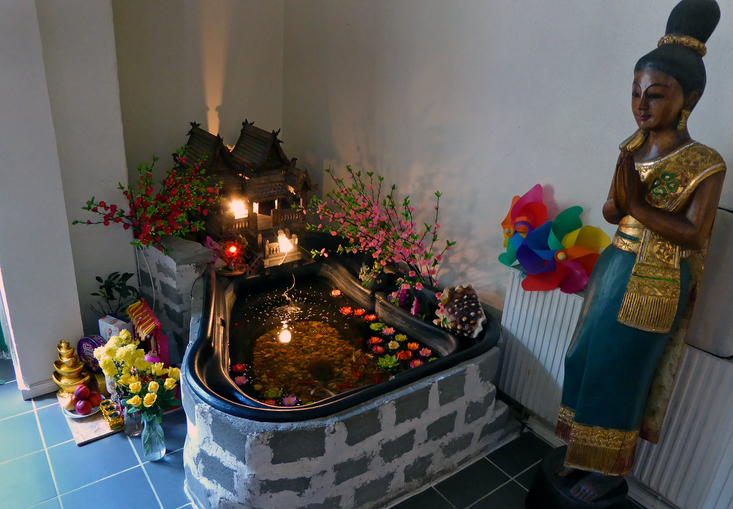 Ett Altare i form av en damm med Karpar, tv ligger diverse offergåvor. Thai restaurang i Ystad.